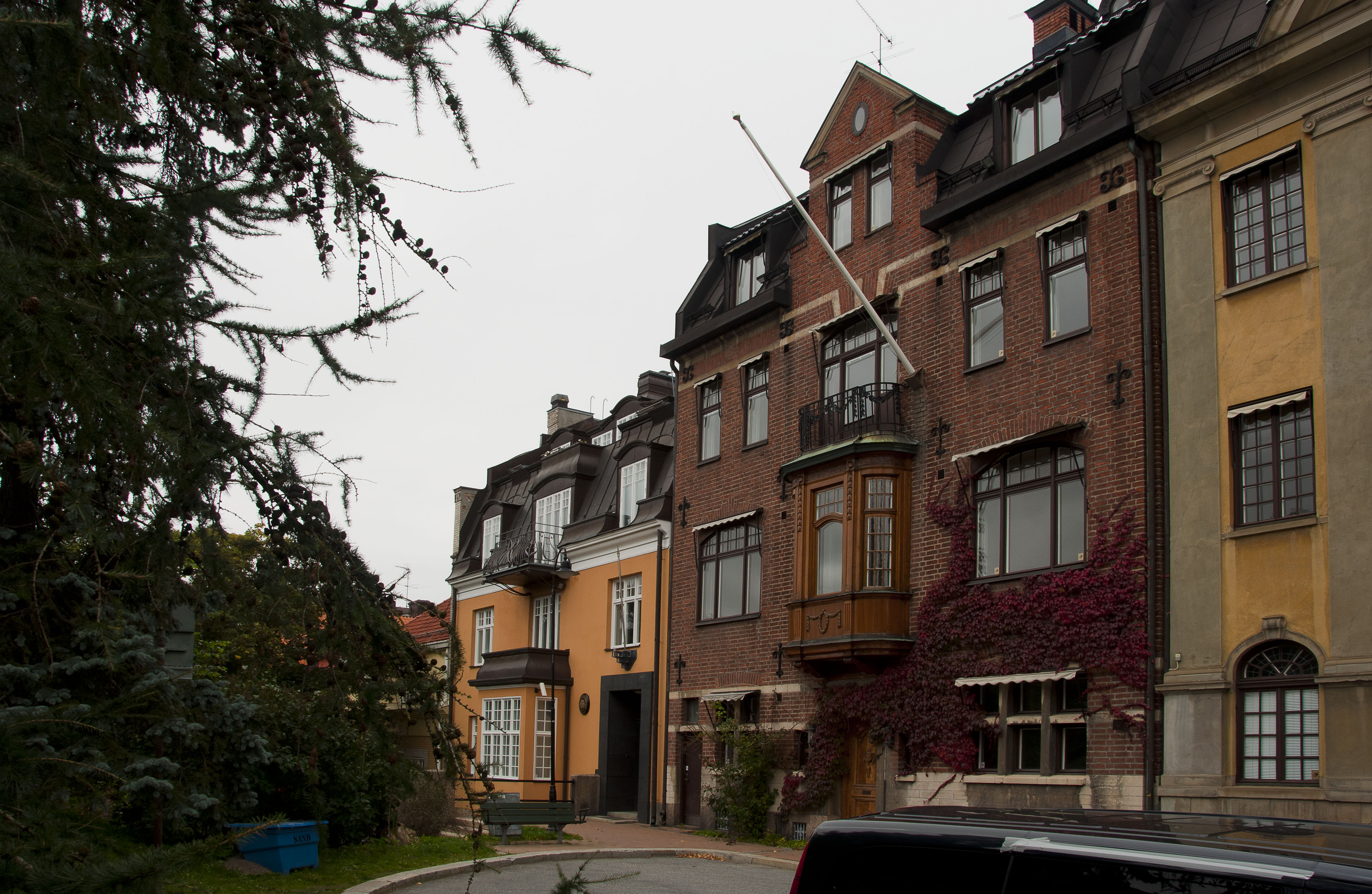 Tyrgatan 5 (Tofslärkan 13): Byggnadsår 1909-10, arkitekt E Josephson, byggherre G Jacobsson, byggmästare A Nordström. Till vänster om föregående Tyrgatan 3 (Tofslärkan 14): Byggnadsår 1910-12, arkitekt N Lovén, byggherre och byggmästare Alb Andersson. Här finns Estlands ambassad i Stokcholm.